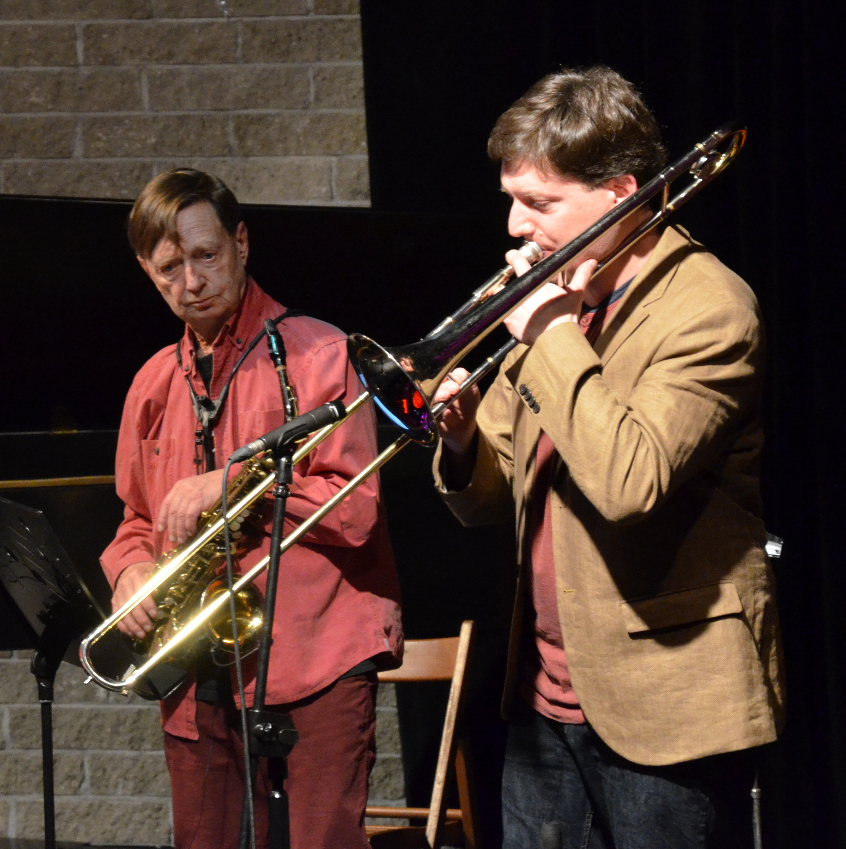 Konzert des Zbigniew Namysłowski Quintet im Klimat-Klub